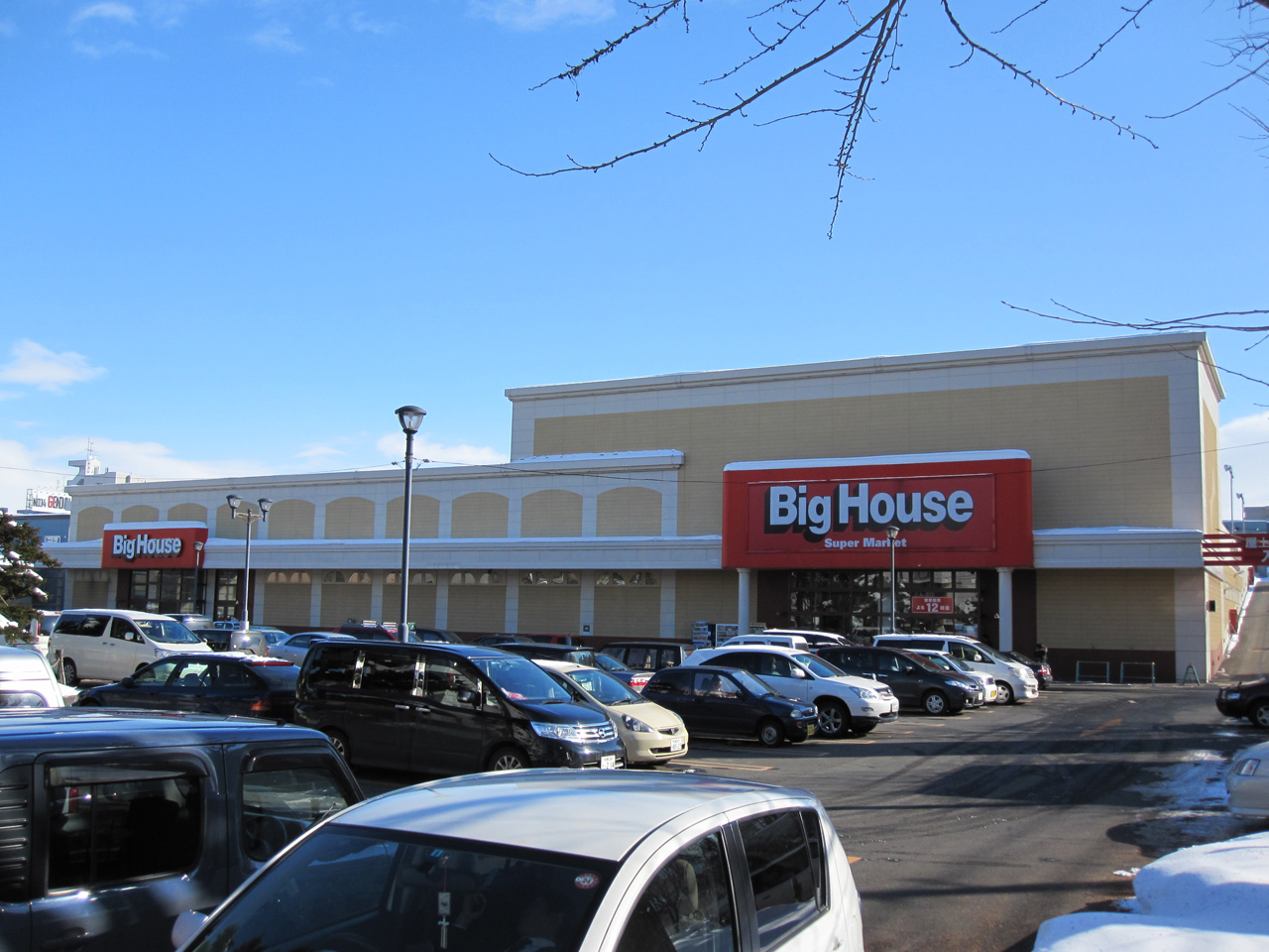 BigHouse白石店